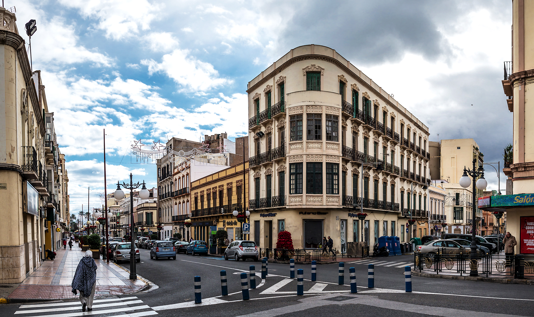 EDIFICIO FERRETERÍA CABANILLAS (1936-1937). Situado en la esquina que forman las calles Sidi Abd-el-kader, 16-18 Avda. Juan Carlos I Rey, 33. MELILLA. Tomada en diciembre 2017.